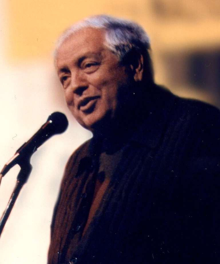 Giorgio Vacchi, italian choir director and ethnomusicologist